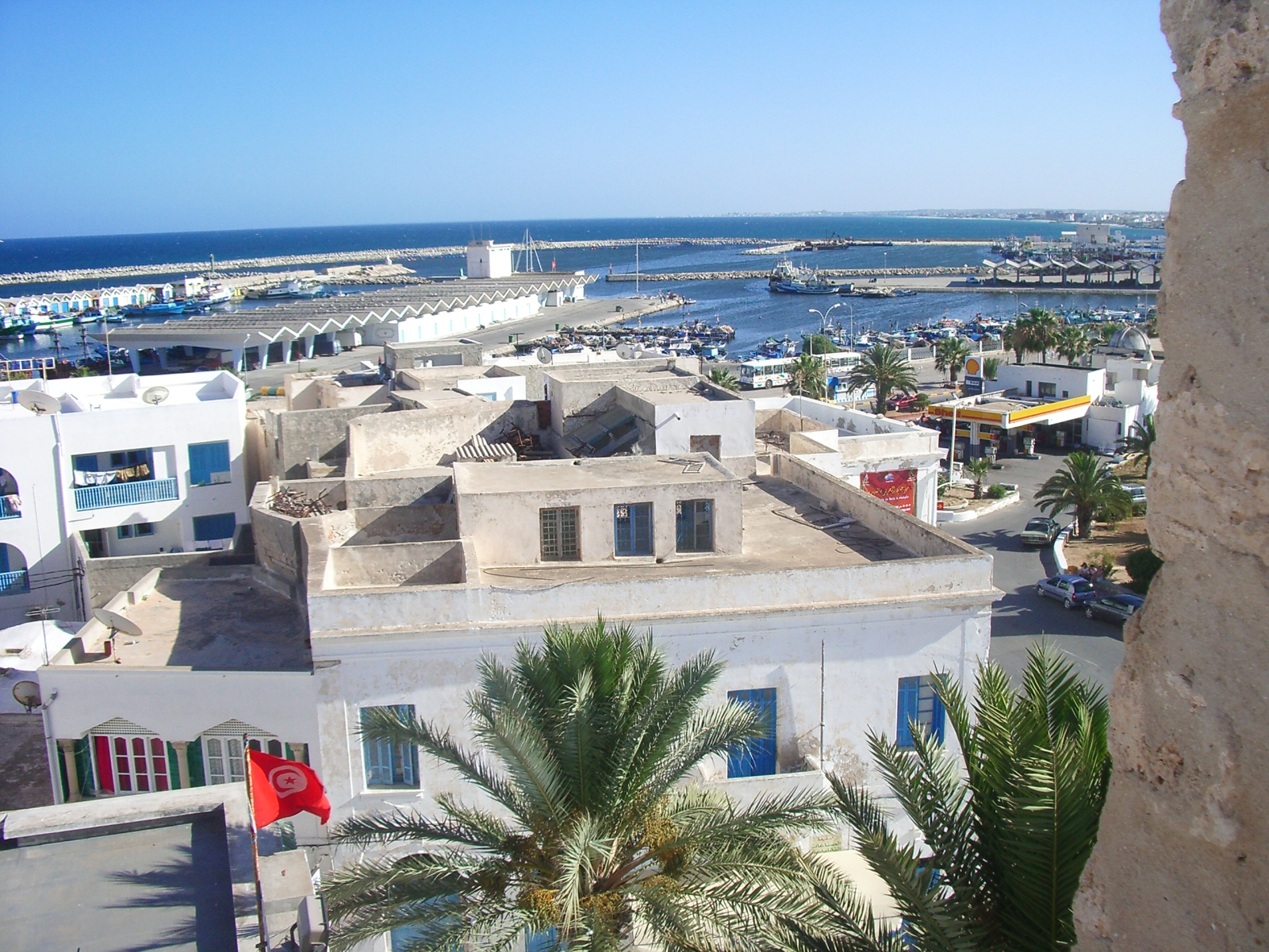 Mahdia des de la Torre Obscura